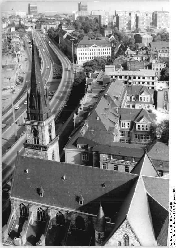 Halle, Stadtzentrum, Elisabeth-Kirche ADN-ZB Lehmann 29.9.81 Halle: Blick auf das Stadtzentrum von Halle mit der Elisabeth-Kirche, dahinter der Thälmannplatz mit der Silhouette moderner Wohnhochhäuser und dem Neubaukomplex an der Voßstraße (r.). In der Mitte die Franckesche Stiftung, ein im Jahre 1695 von August Hermann Francke gegründetes Waisenhaus mit Schulanstalt. Hinter der Kirche ist auch das kirchliche Elisabeth-Krankenhaus zu sehen.